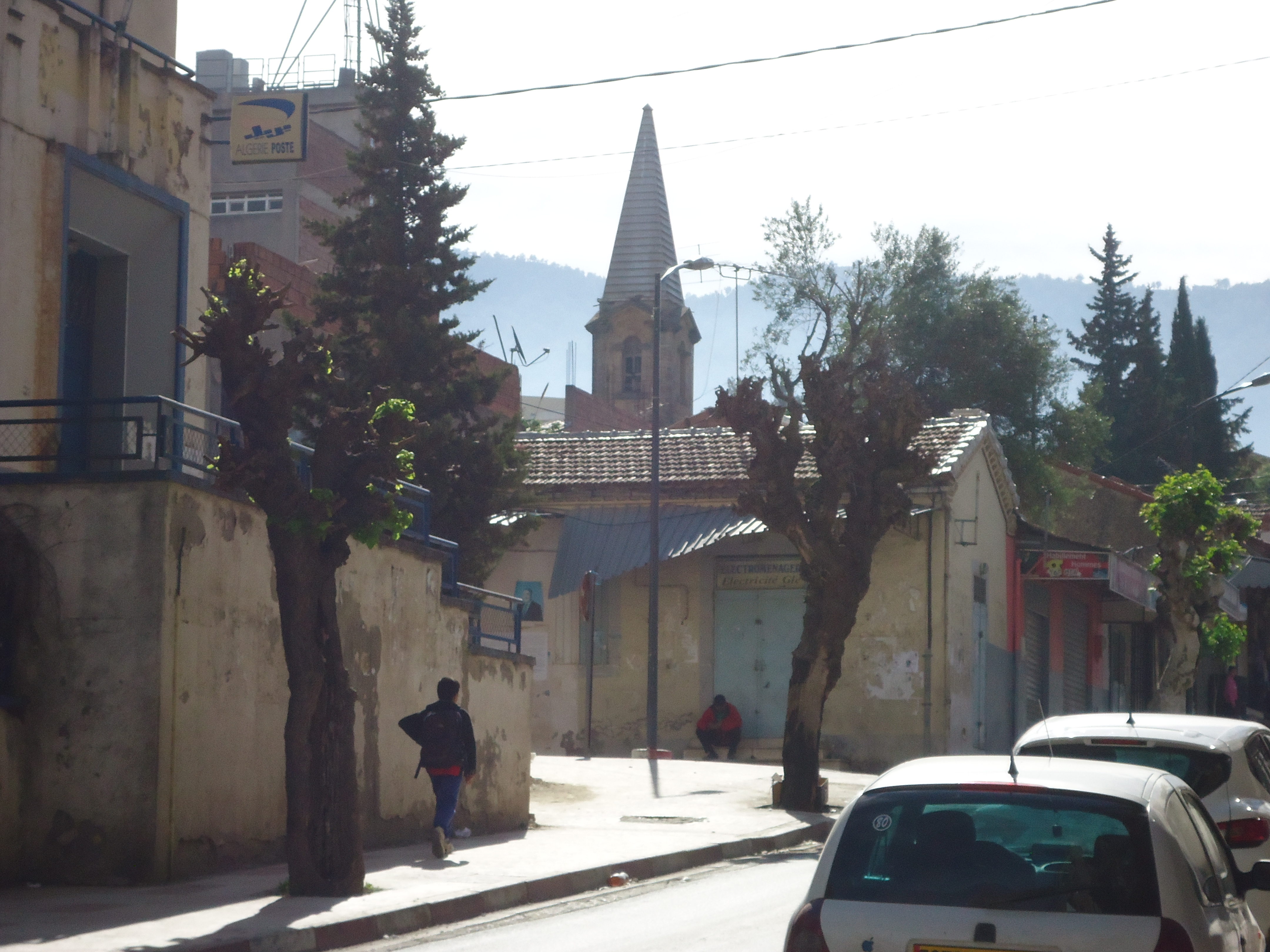 i3ezzugen